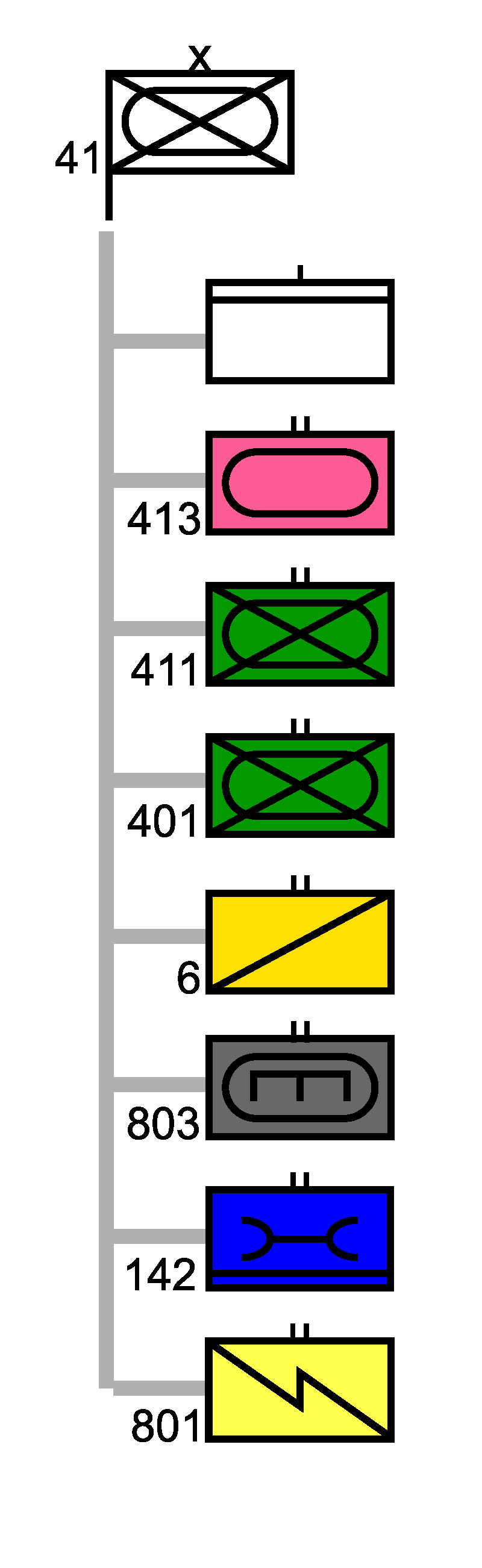 Gliederung PzGrenBrig 41 im deutschen Heeres.